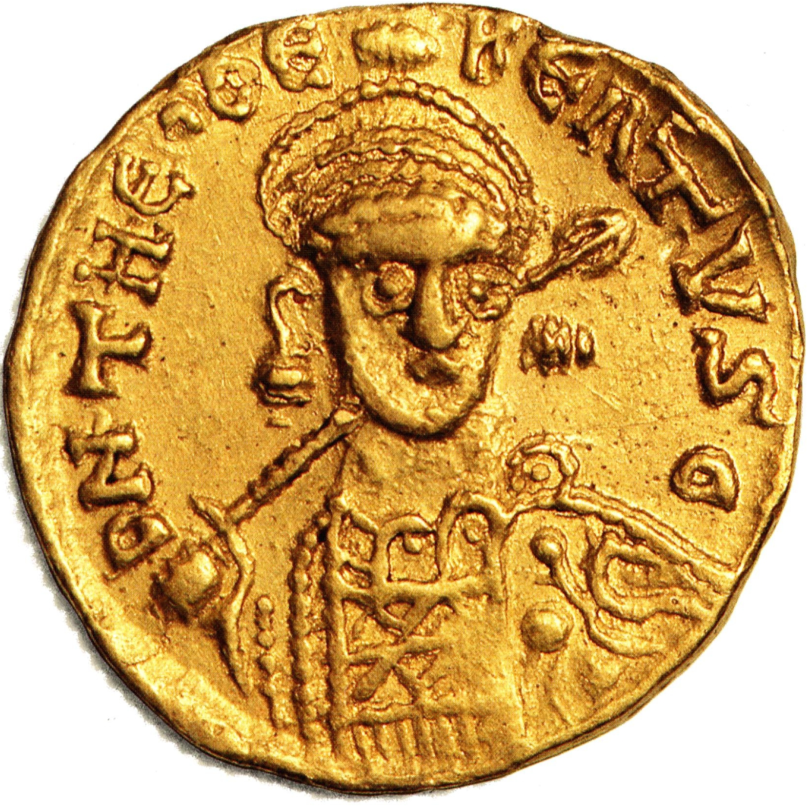 Gold-Solidus des Frankenkönigs Theudebert I. (um 500-548), Münzstätte Mainz, ca. 534, gegenwärtiger Eigentümer Dt. Bundesbank.